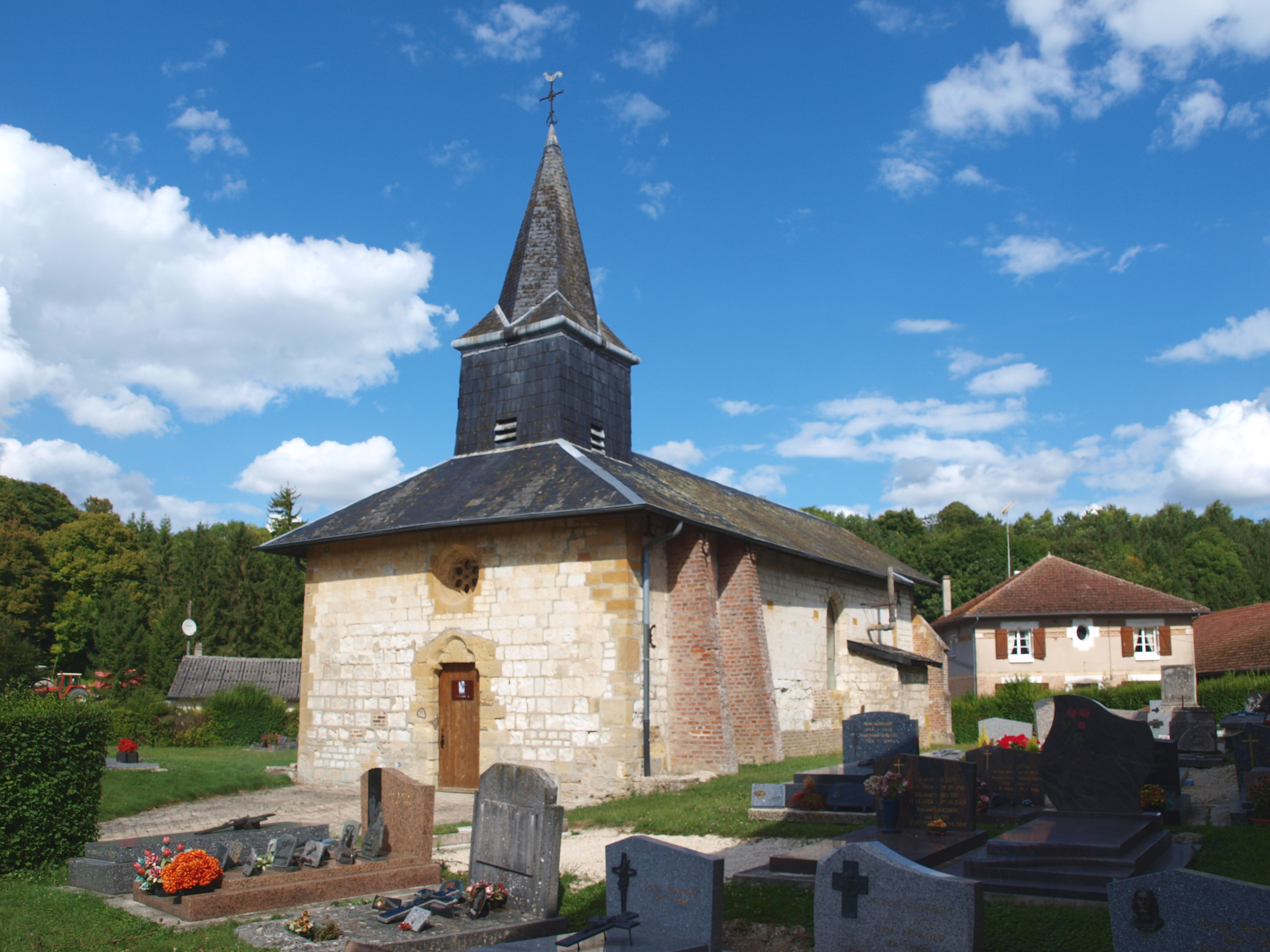 Aure (Ardennes, France) ; église.